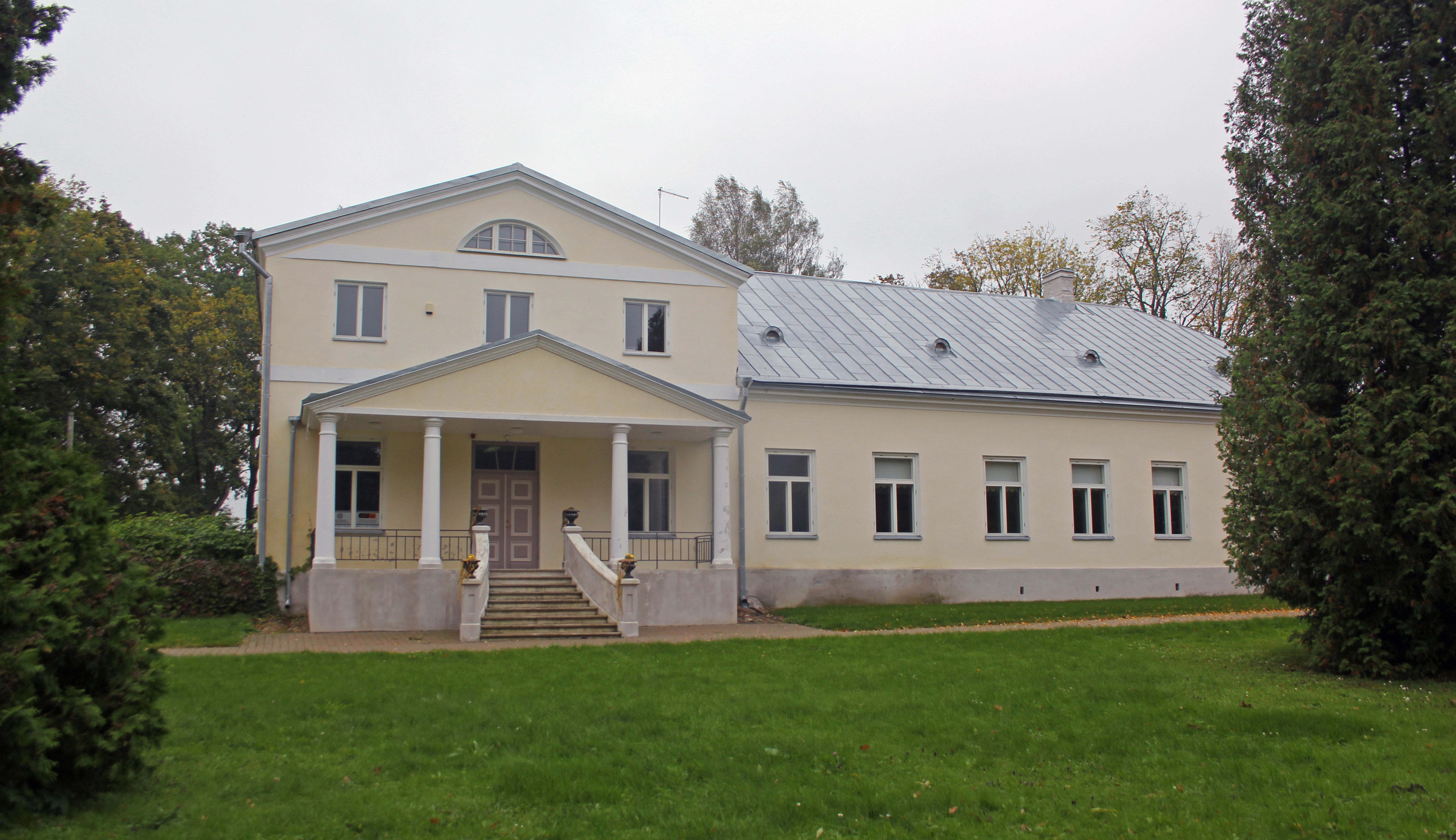 Pajusi mõisa peahoone